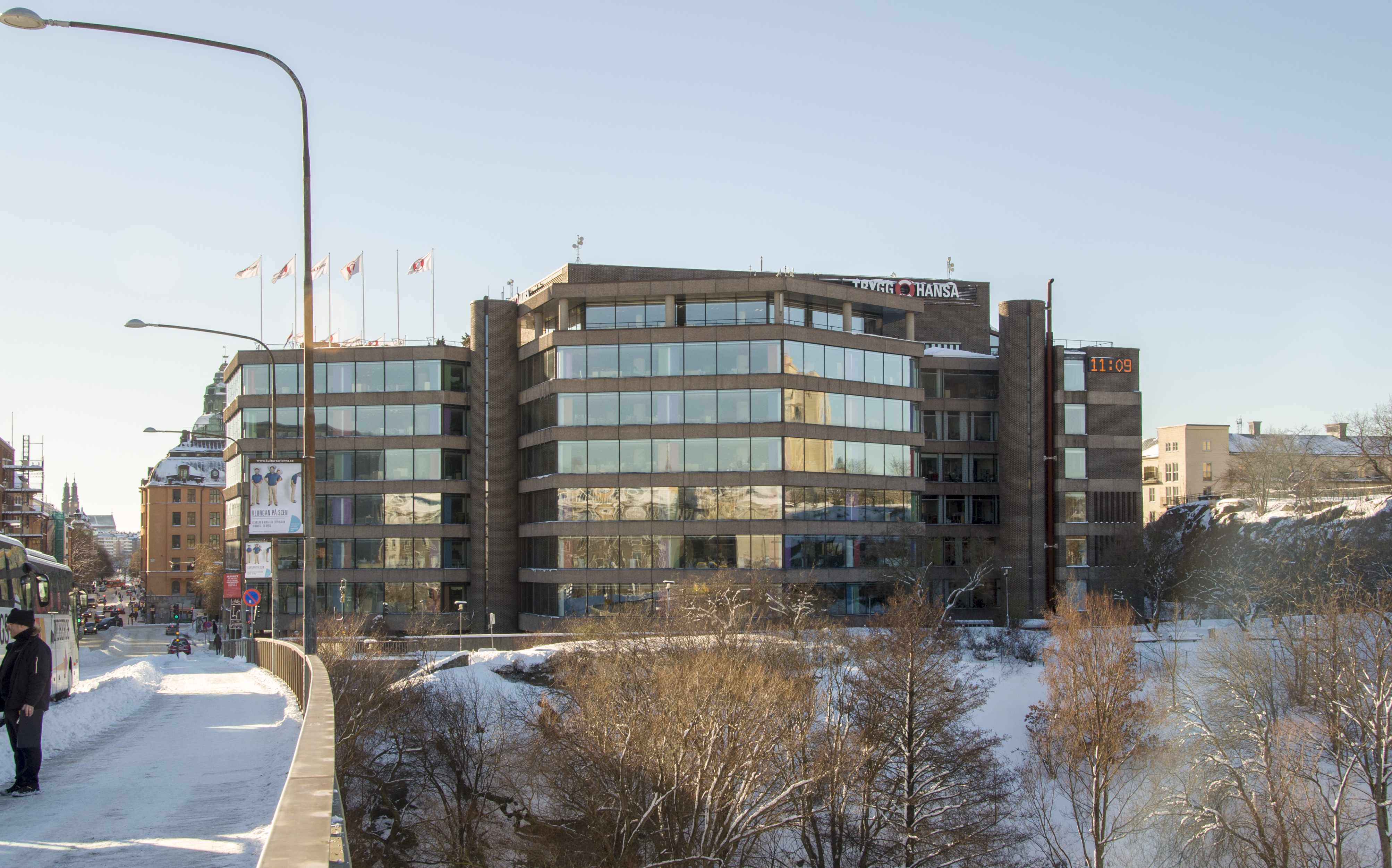 Trygg-Hansahuset Nybyggnadsår 1972 - 1977 Anders Tengbom (Arkitekt) Försäkringsbolaget Trygg-Hansa (Byggherre) S. Salamon (Arkitekt)